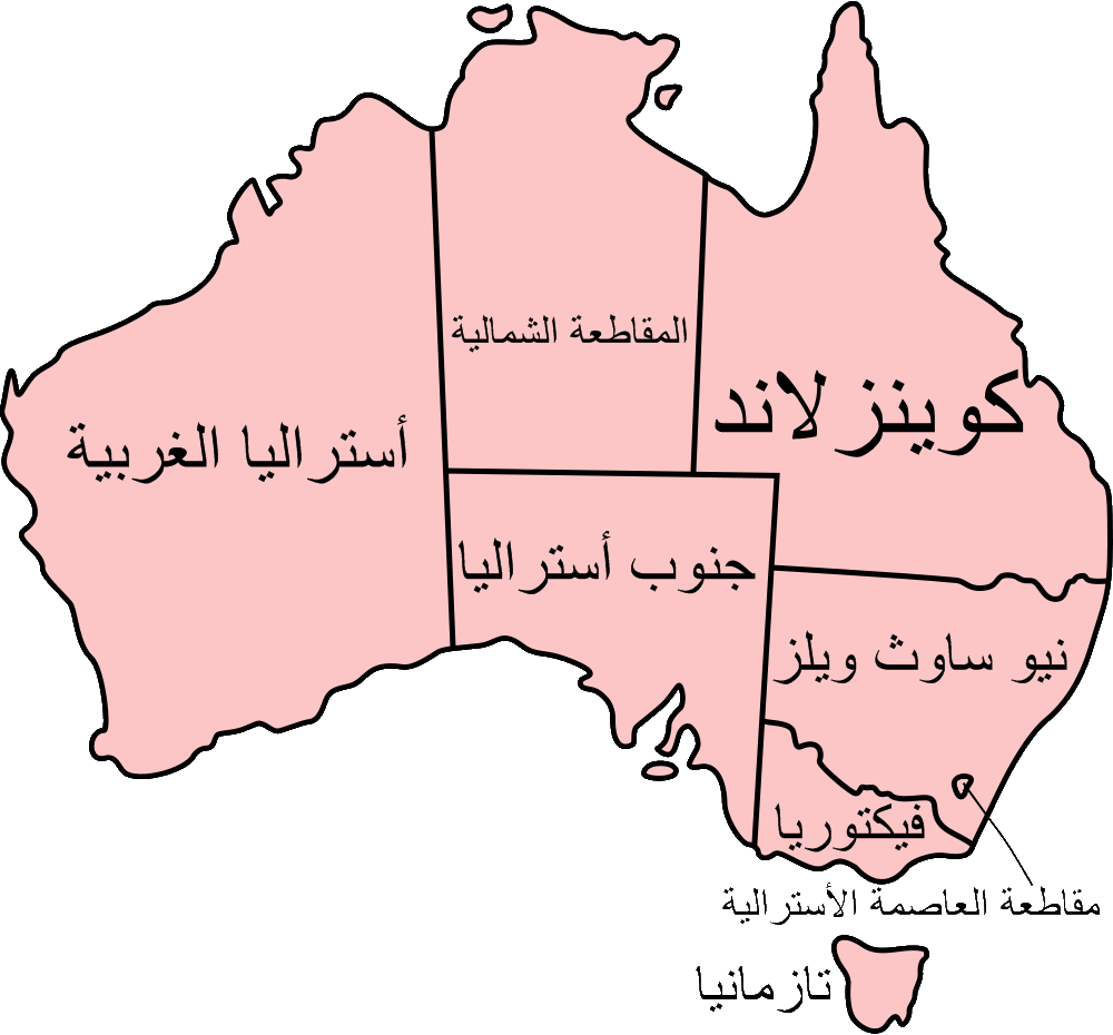 صورة للولايات و المقاطعات الأسترالية مع أسماءها باللغة العربية